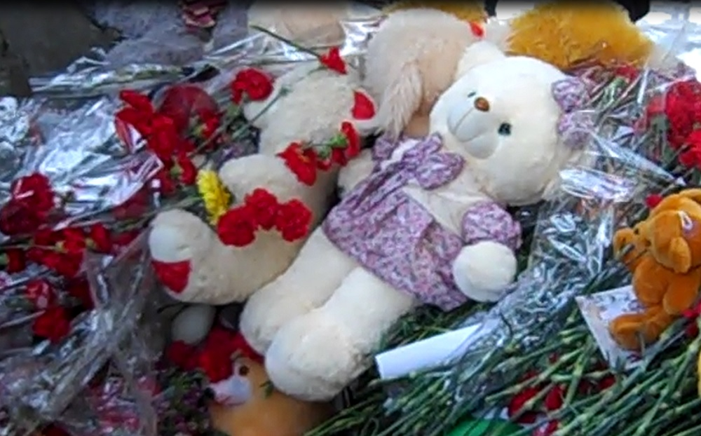 Yanğında həlak olanların xatirəsi anılır